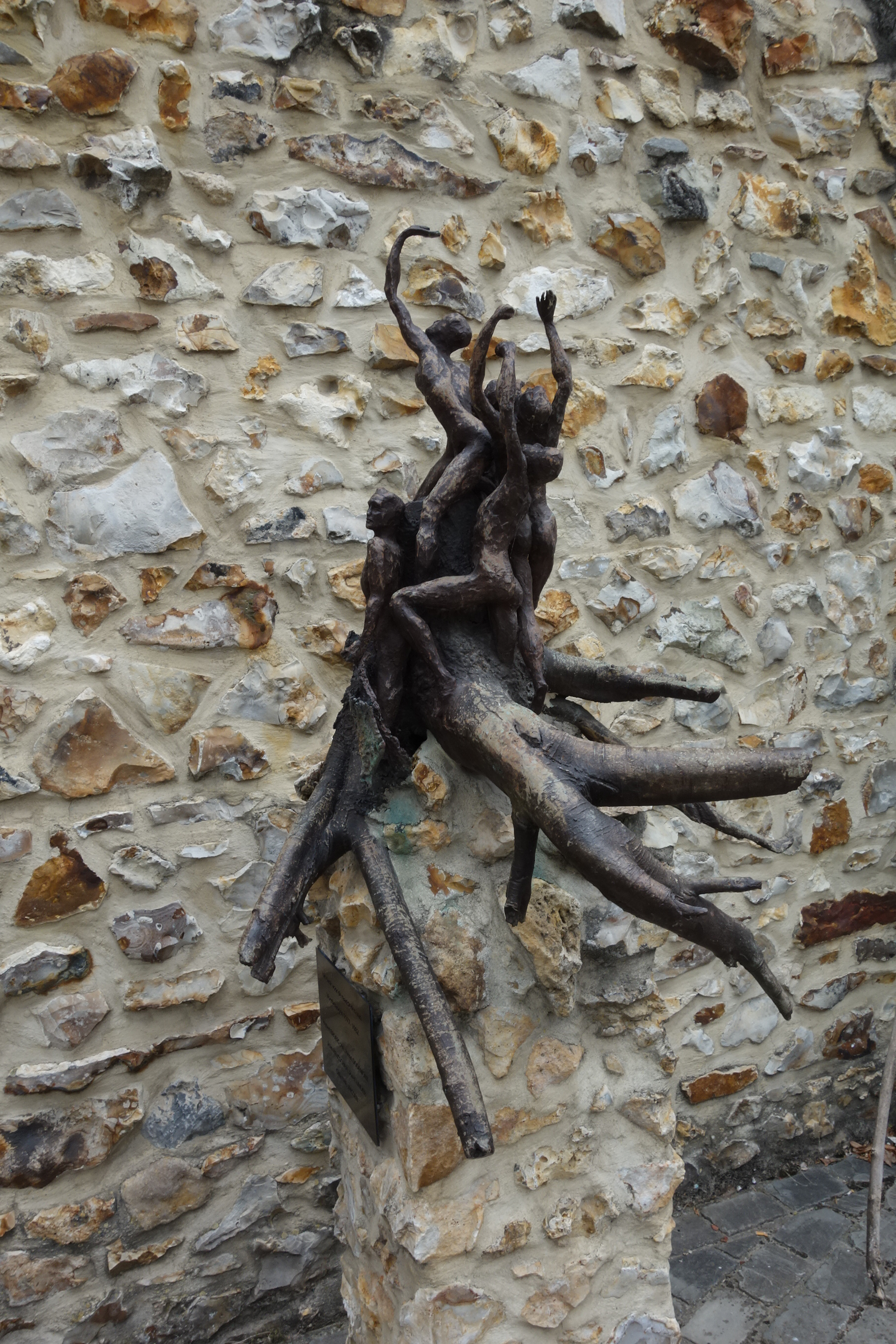 Bronzen beeld genaamd 'Voerense Heropleving' door François Joré, is een monument voor de eerste vijf gemeenteraadsleden van de partij Voerbelangen in 1977 in de Vlaamse faciliteitengemeente Voeren in Belgisch Limburg. Monument onthuld op vrijdag 1 april 2011. Foto genomen in juli 2020.